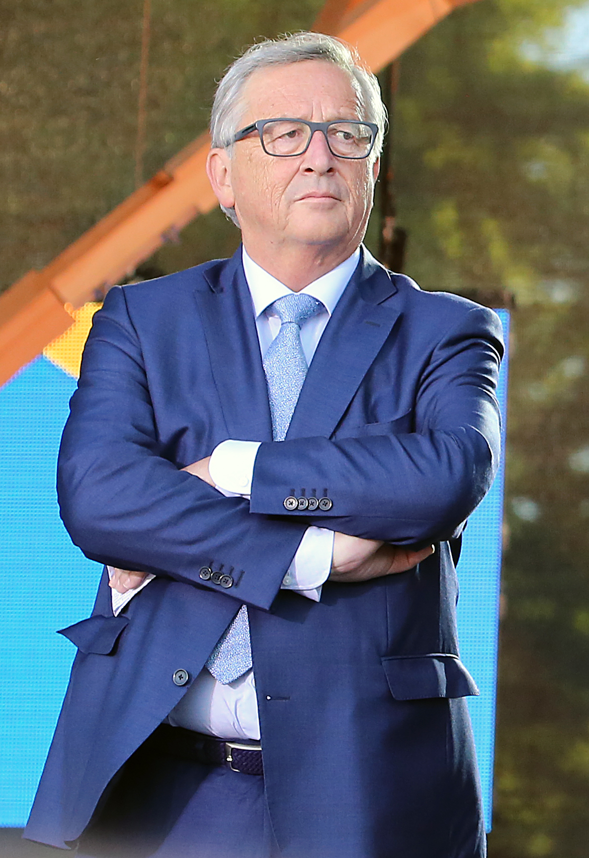 Jean-Claude Juncker